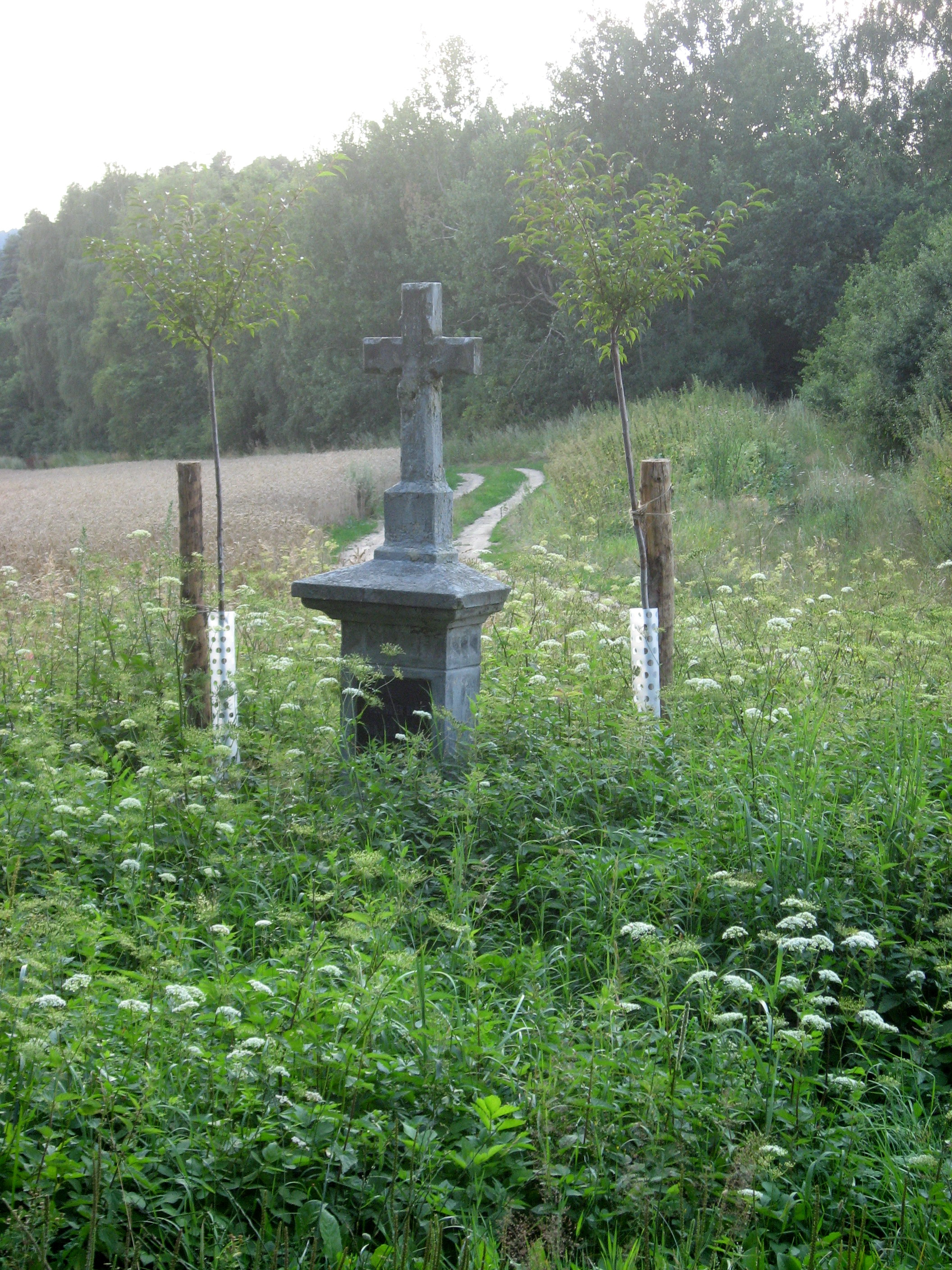 Kříž u křižovatky mezi Vadčicemi a Dehtáři